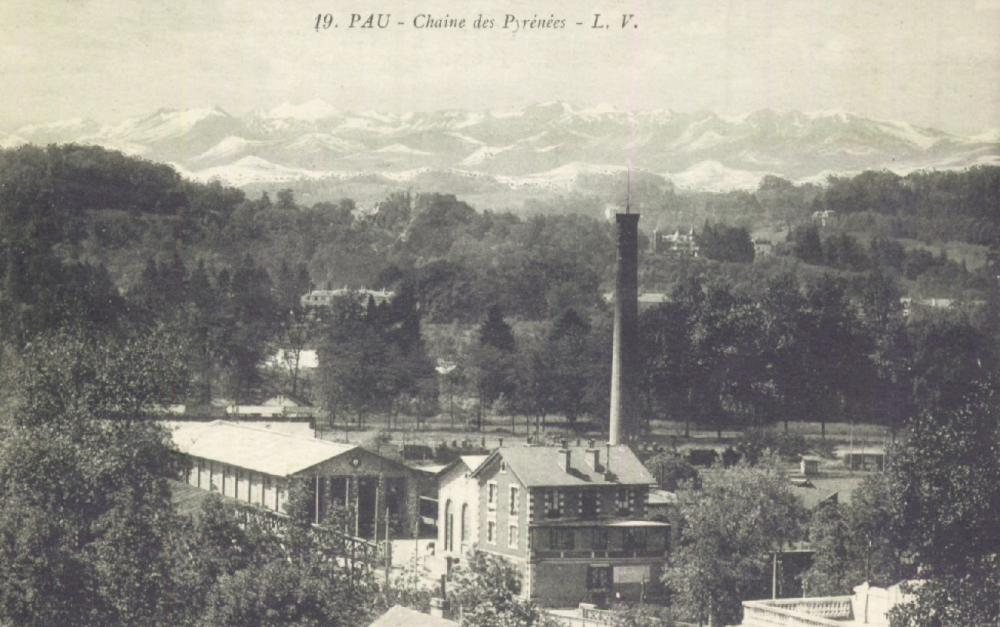 Carte postale non oblitérée avec vue sur les Pyrénées et l'usine des tramways de Pau